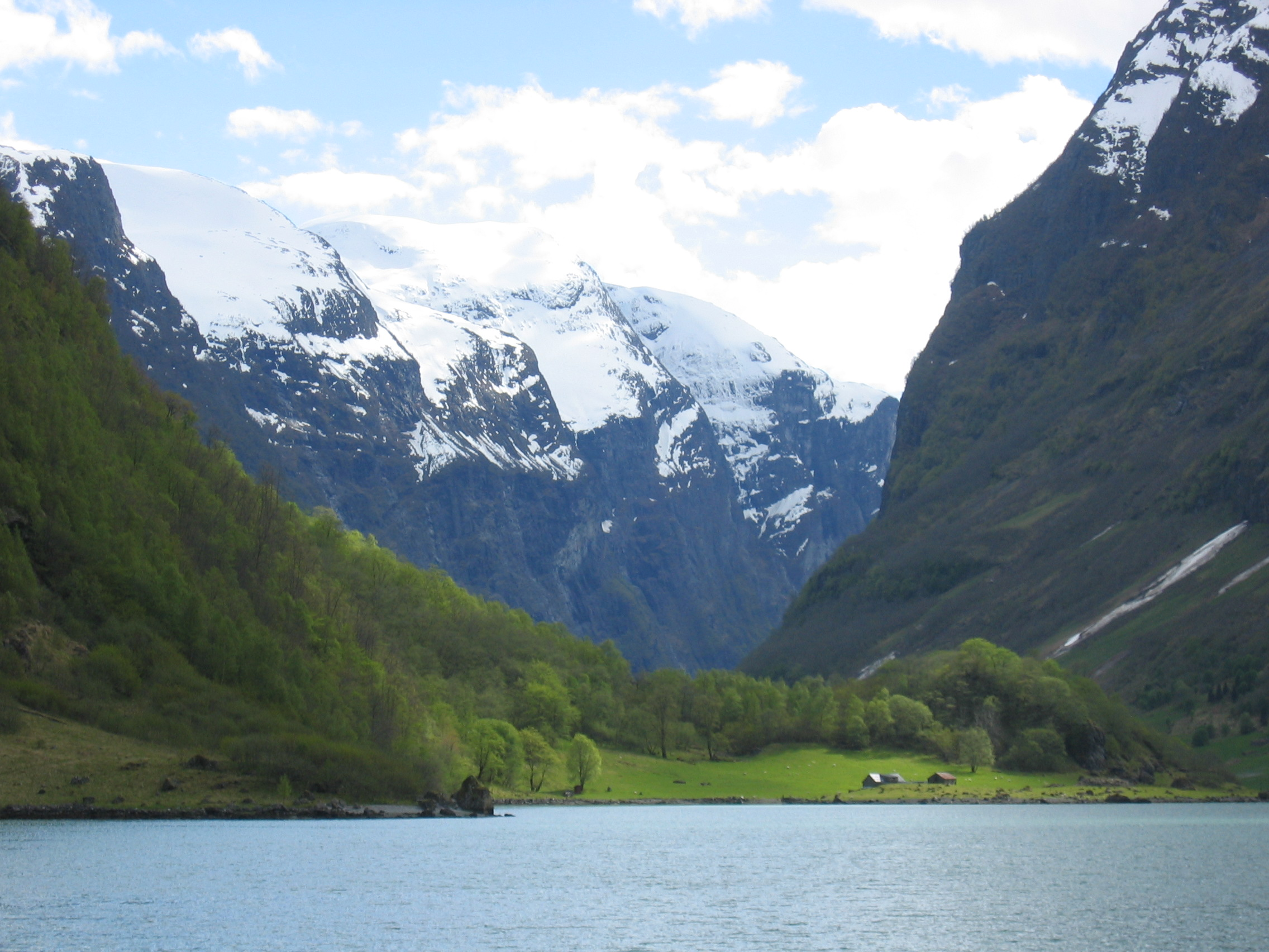 Holmo i Nærøyfjorden